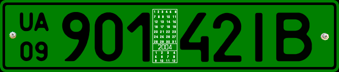 Транзитный номер Украины, 2003-2004 годы